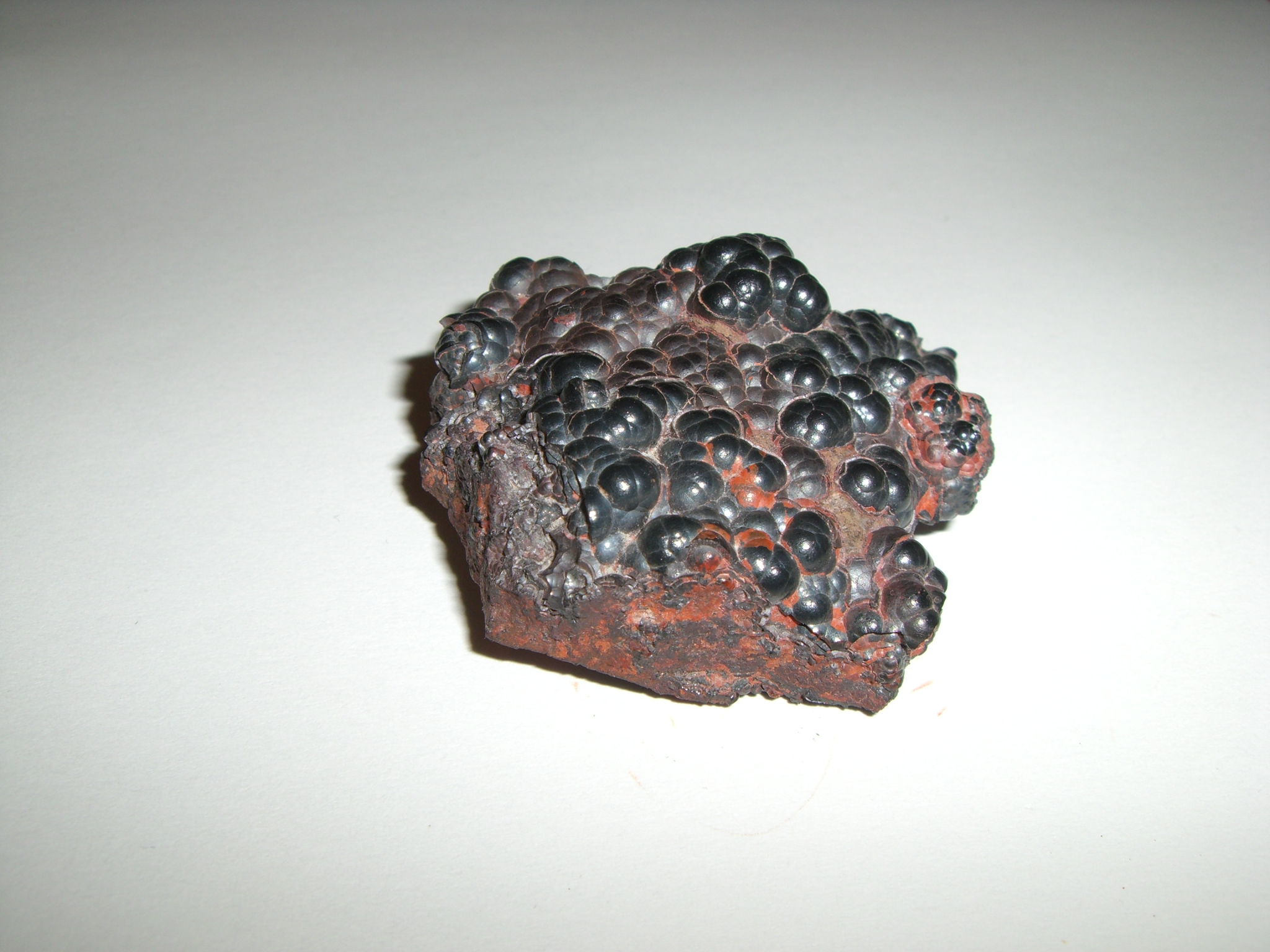 Roter Glaßkopf Hämatit